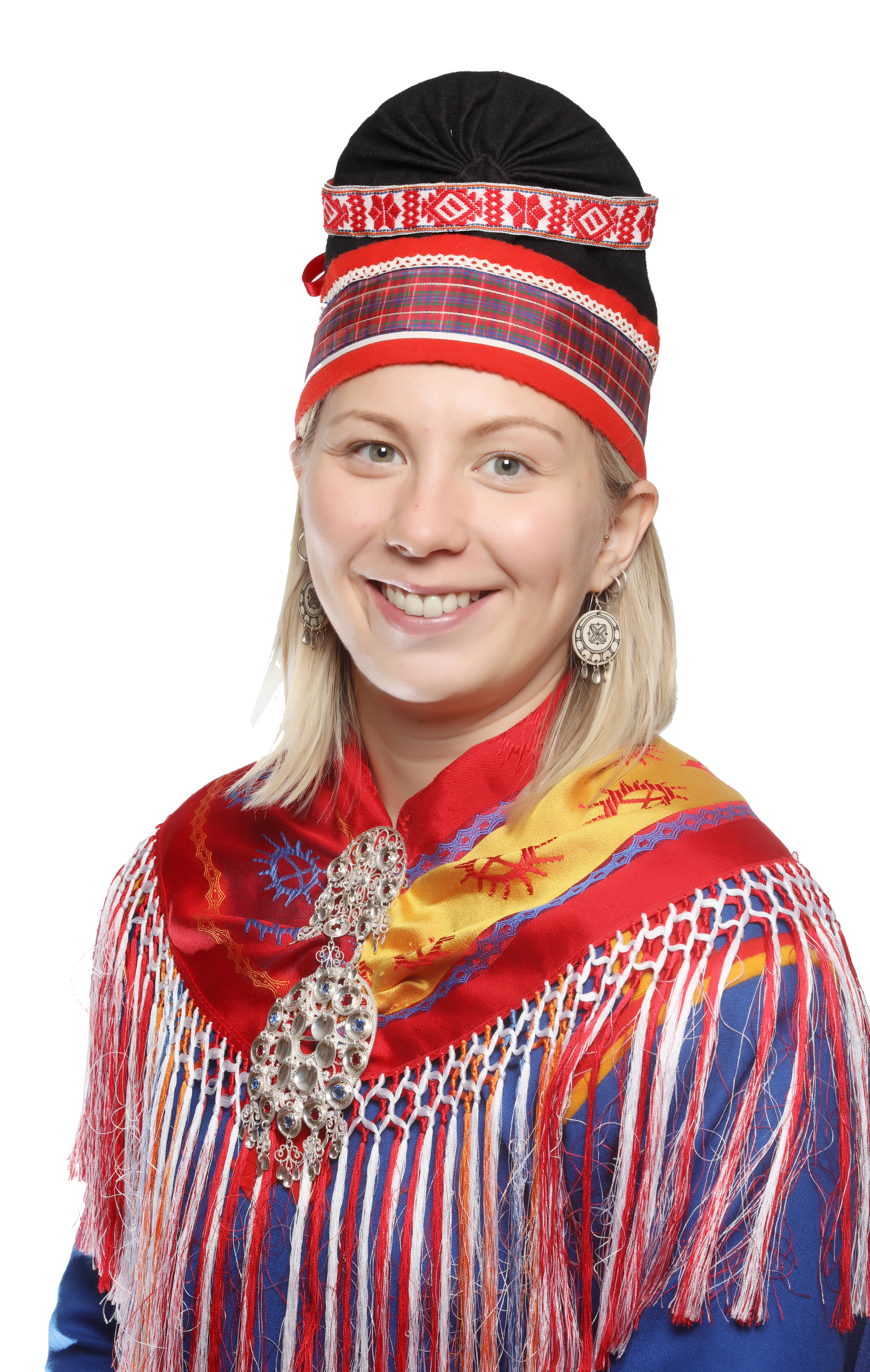 Anne Henriette Reinås Nilut sametingsrepresentant 2017